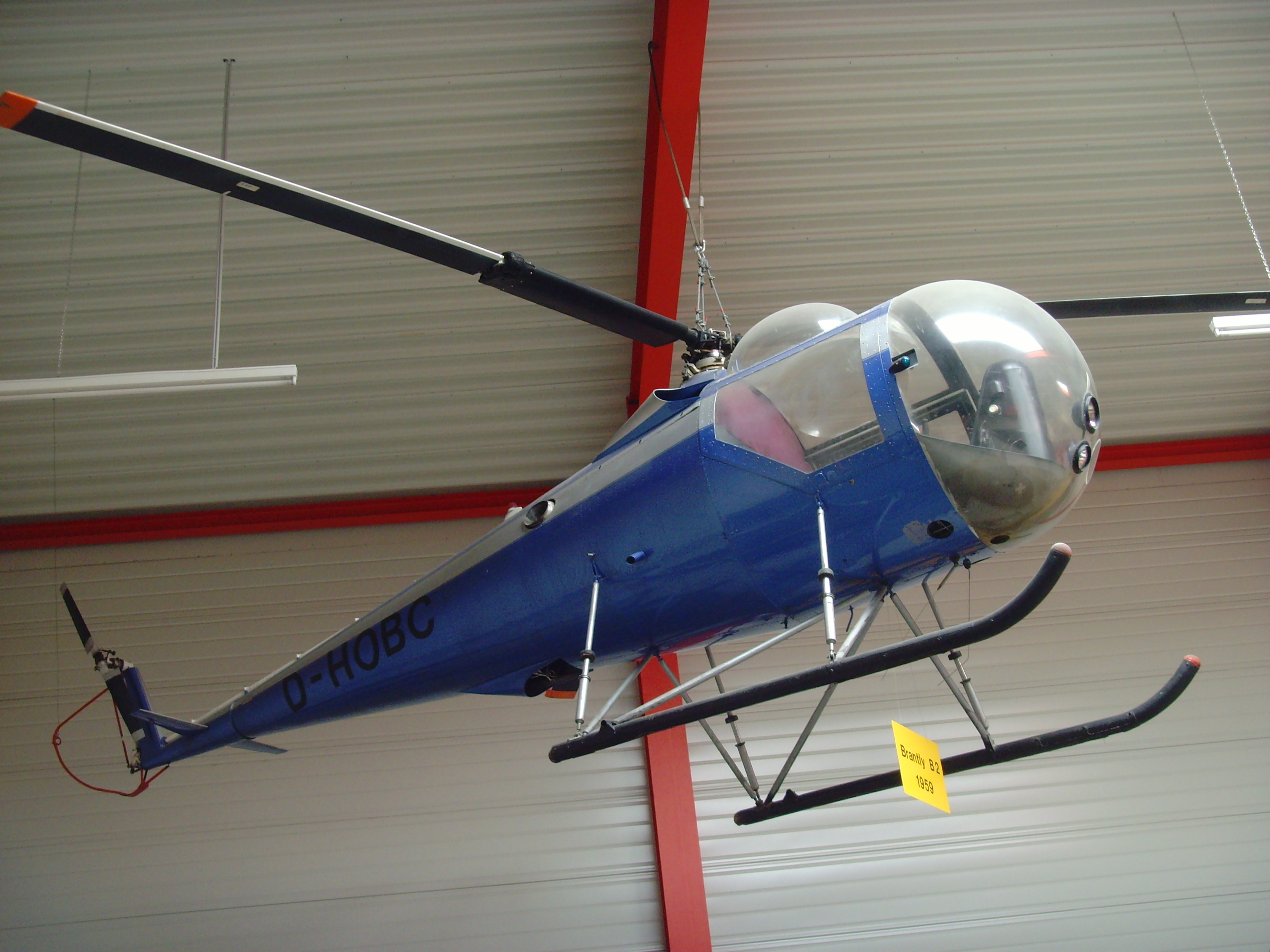 Flugausstellung Hermeskeil Brantly B2